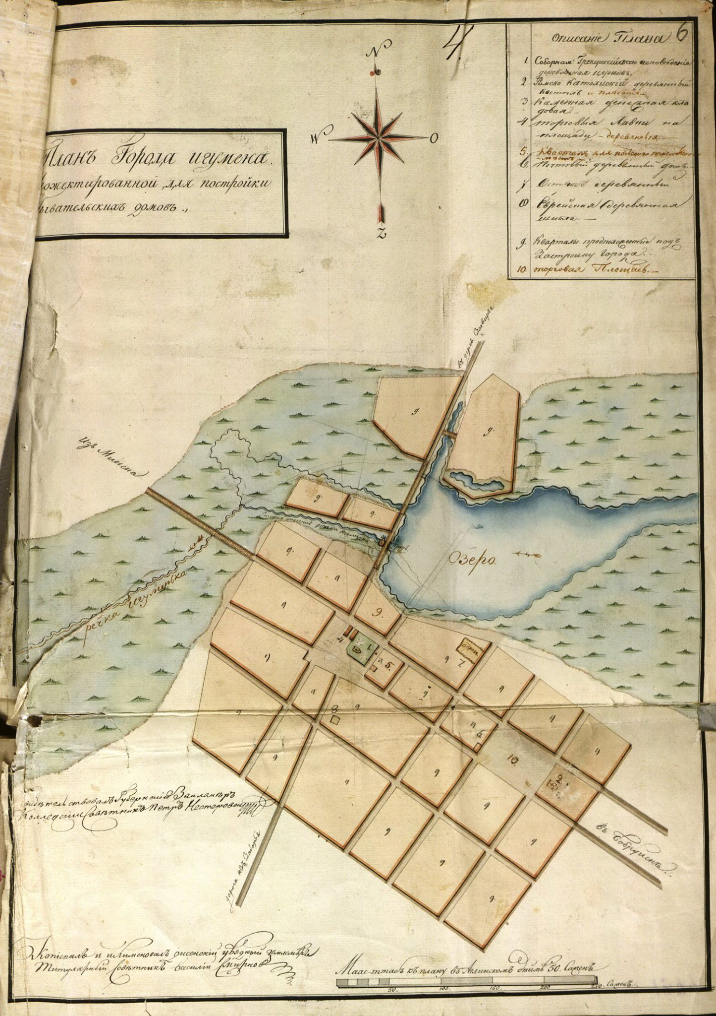 Беларуская (тарашкевіца): Ігумен (Ihumien). Плян места